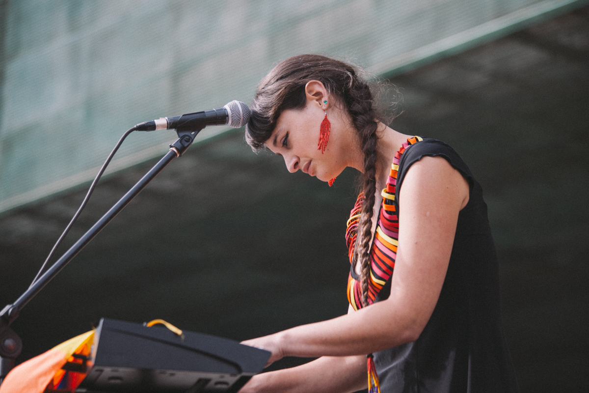 Pascuala Ilabaca en conmemoración 40 años golpe de Estado en Museo de la Memoria.